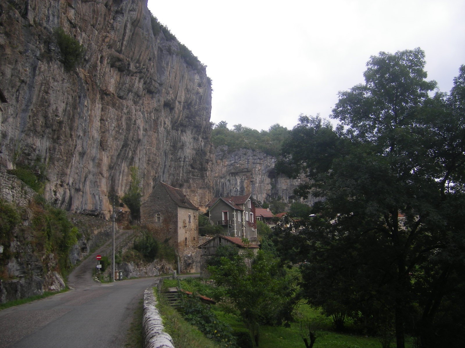 Cabrerets